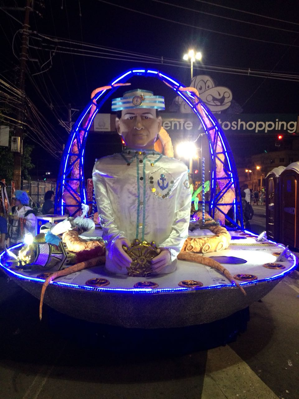 Carnaval 2018 - 2ª Alegoria do GRES Feitiço do Rio